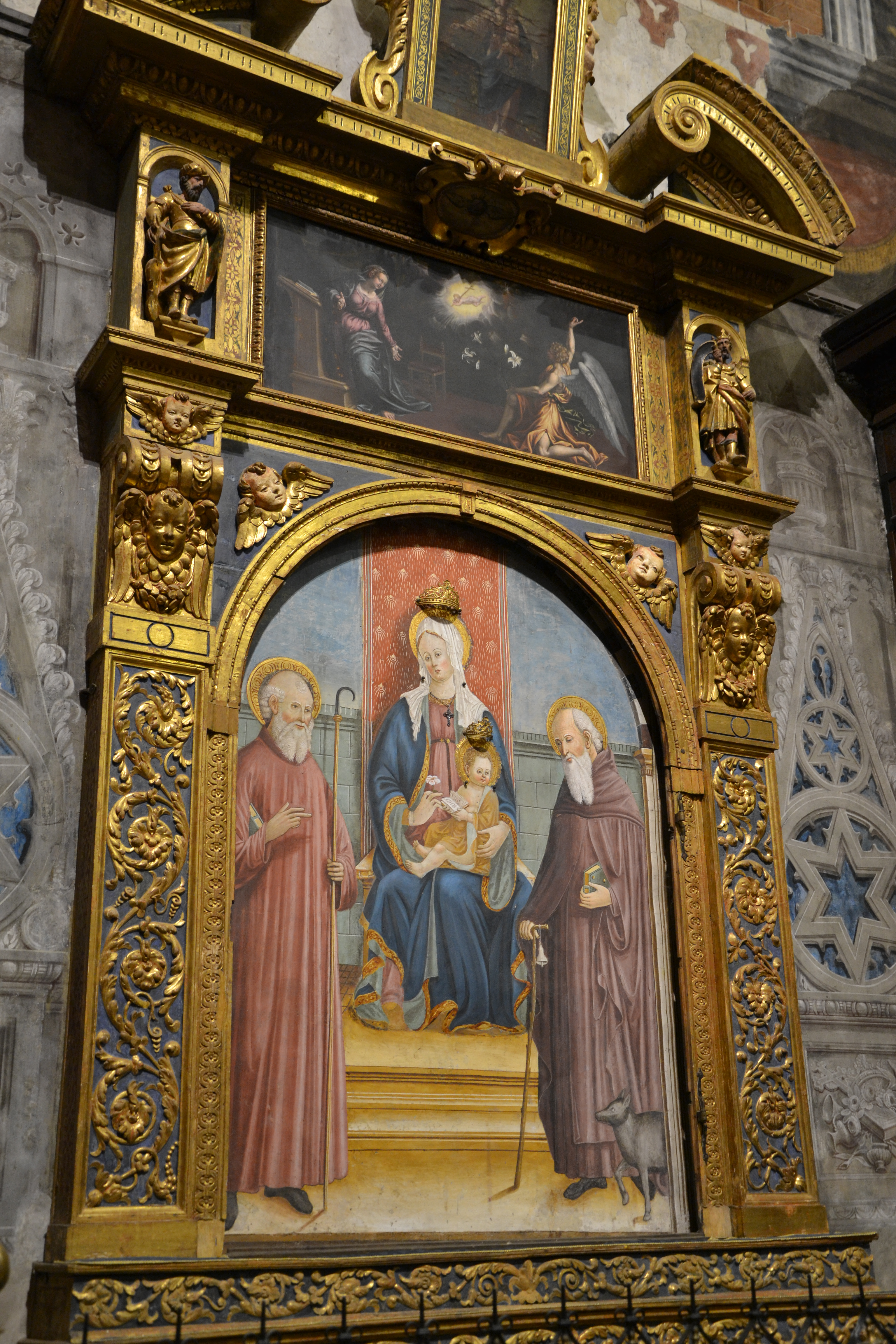 Chiesa di Santa Maria del Carmine (Pavia)